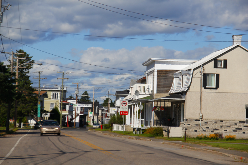 Photo Paul-Émile Poulin-Jacques